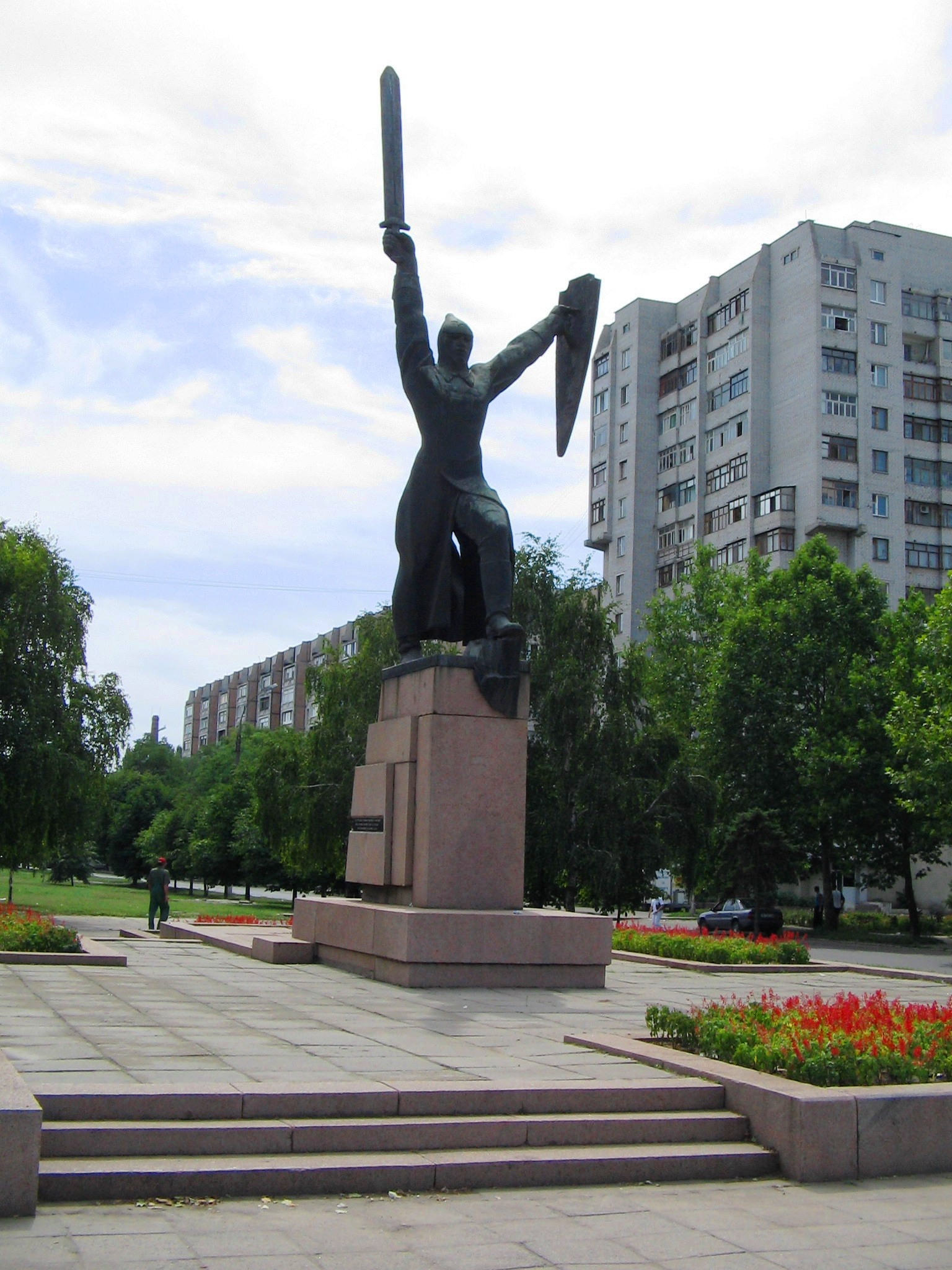 Памятник чекистам (Николаев)